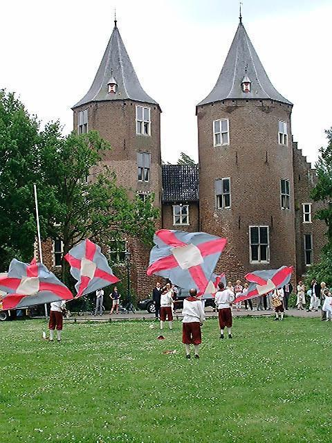 foto gemaakt door familielid tijdens kasteeldag